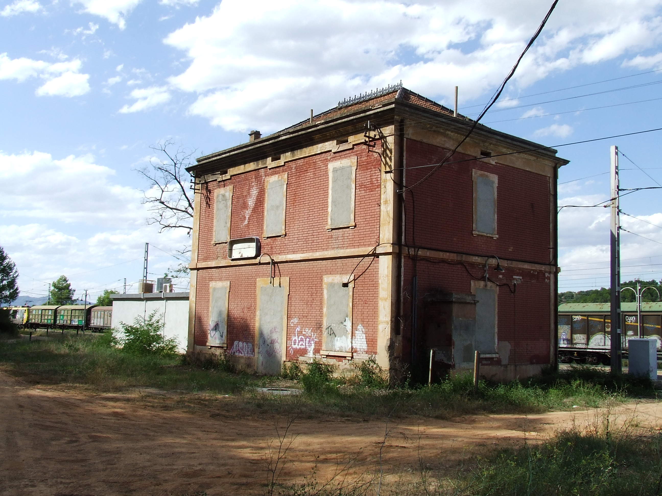 Estació de ferrocarril dels Guiamets (el Priorat)